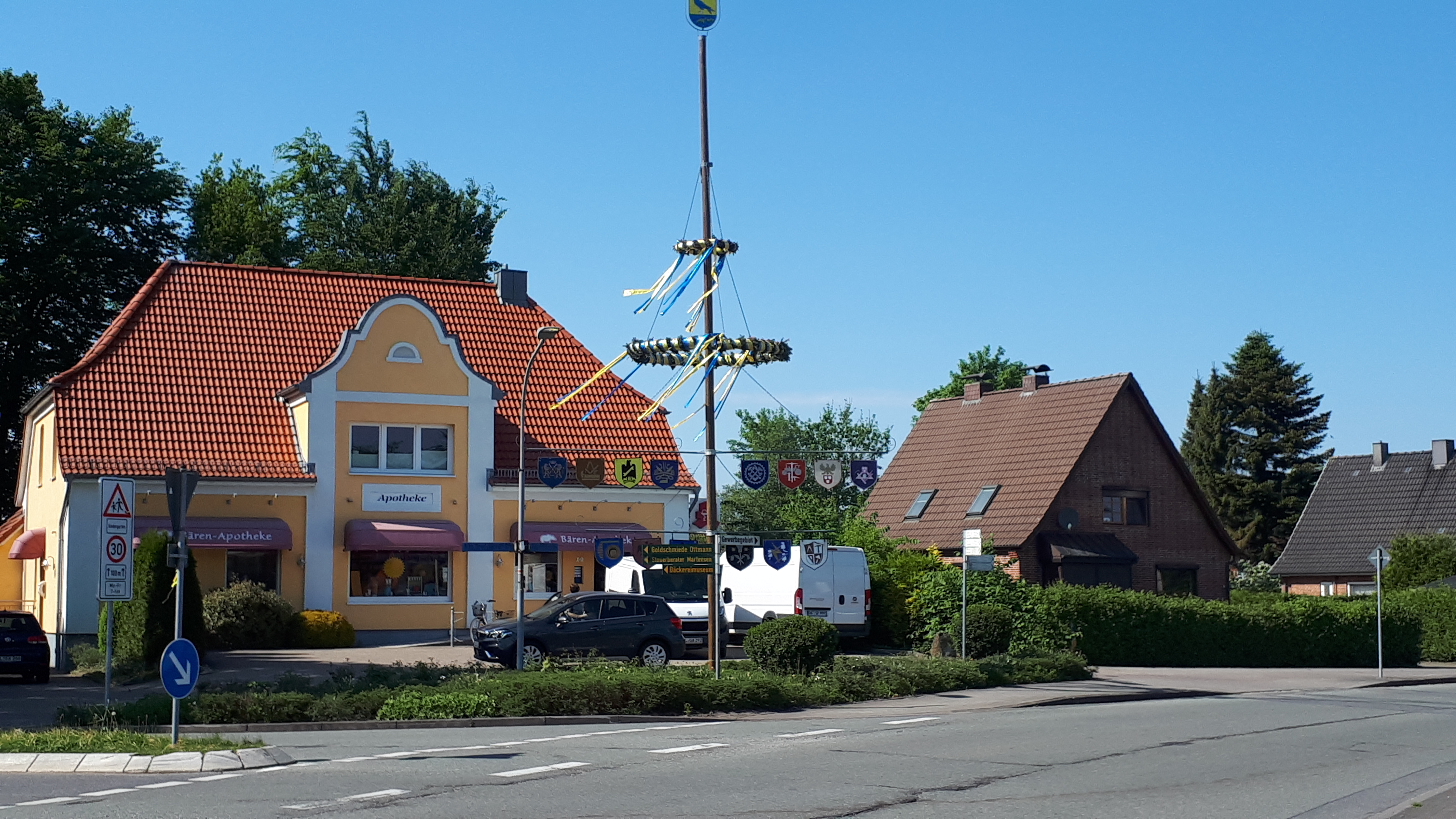 Maibaum in Großenwiehe, Mai 2018